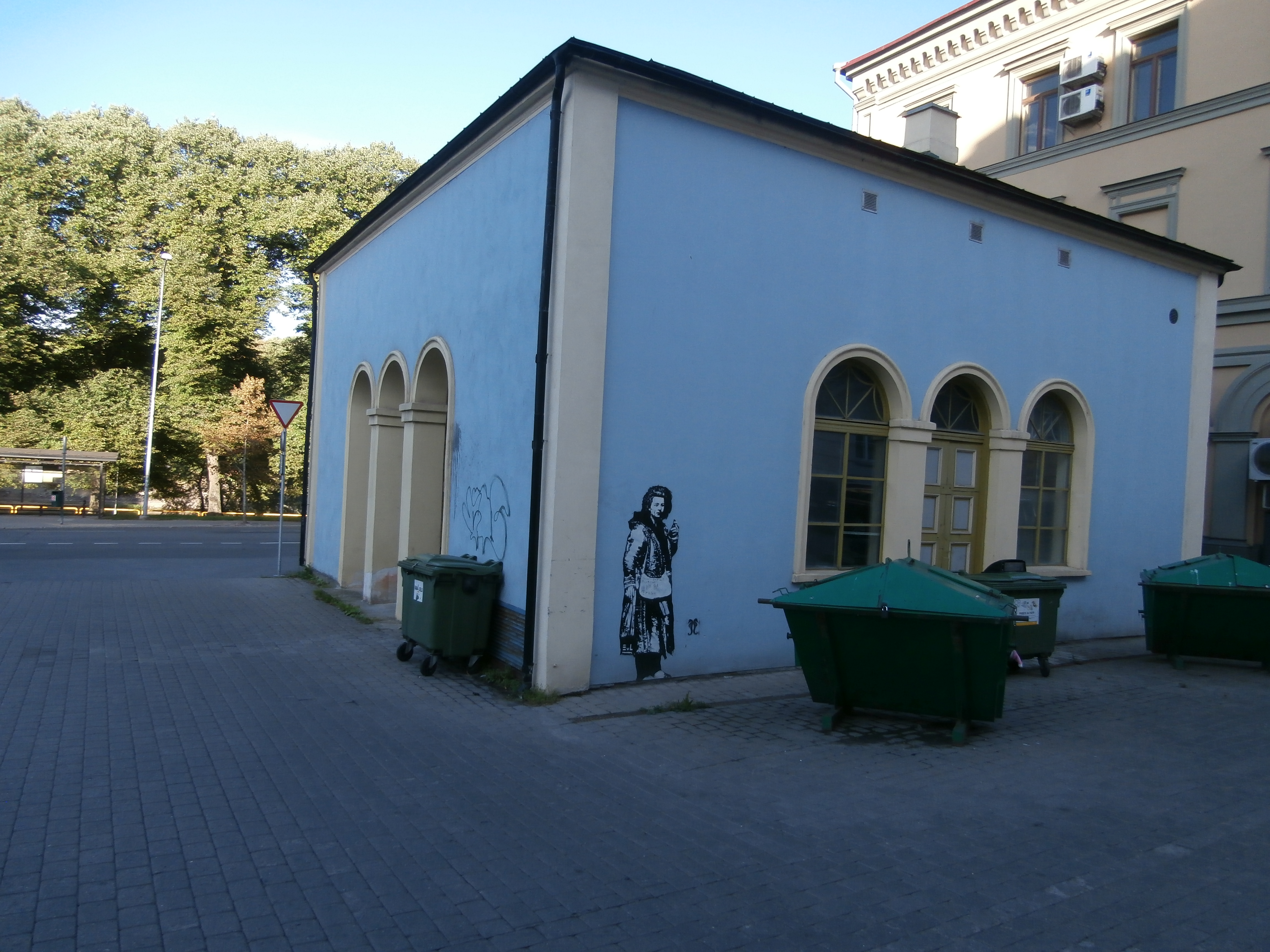 grafiti Tartus Vabaduse puiesteel. Lydia Koidula.